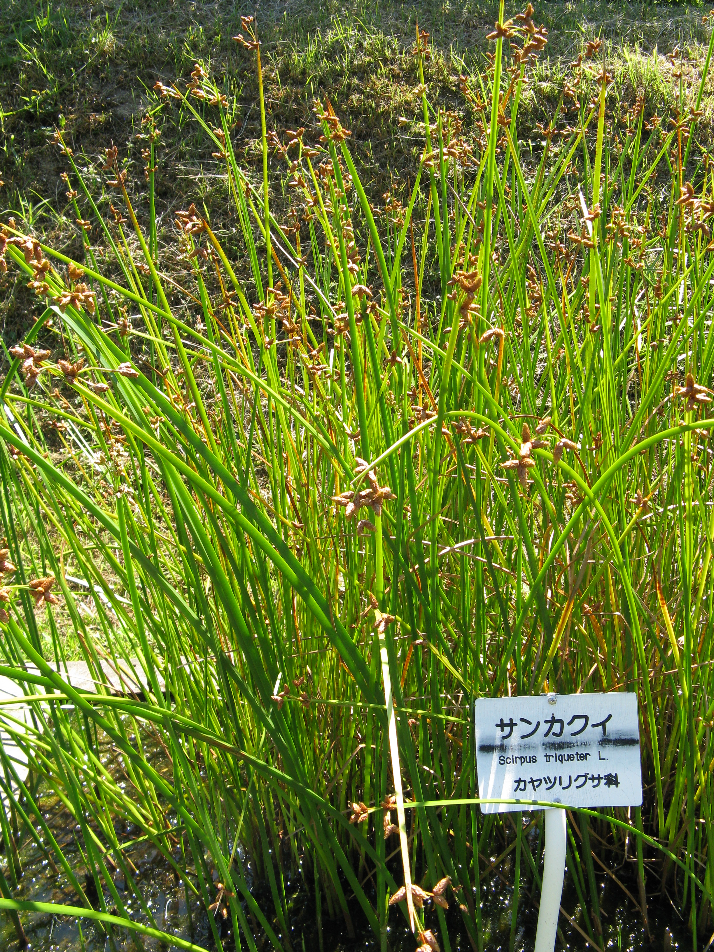 Scientific name Schoenoplectus triqueter